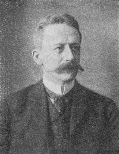 Рудольф Рудольфович фон-Транзеге, чиновник Сената, затем сенатор.